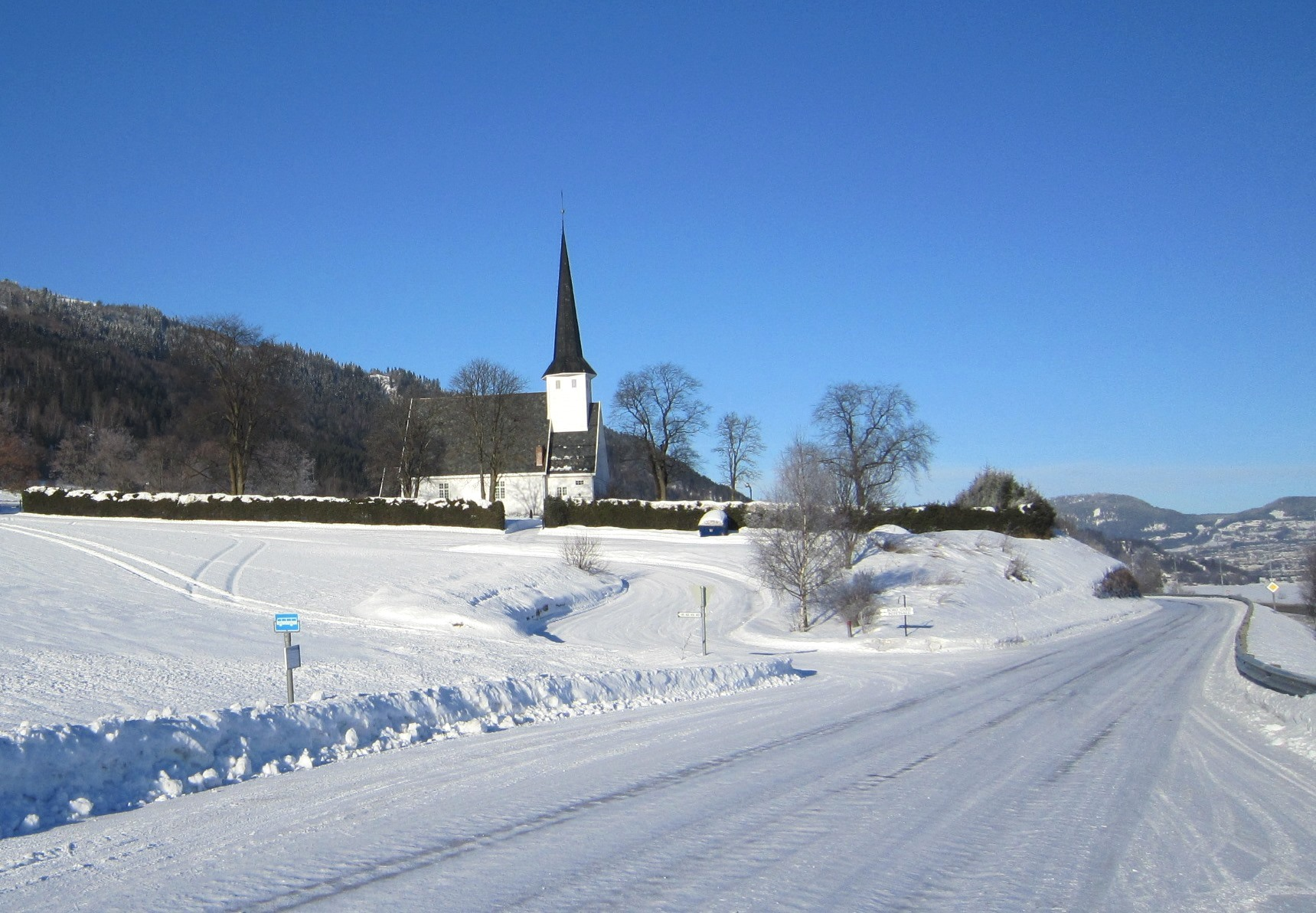 Vingromsvegen (fylkesvei 2540, tidl. 331) går forbi Vingrom kirke.